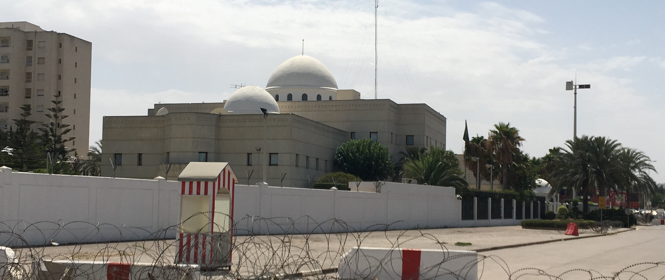 Ambassade d'Arabie Saoudite en Tunisie, 2019.